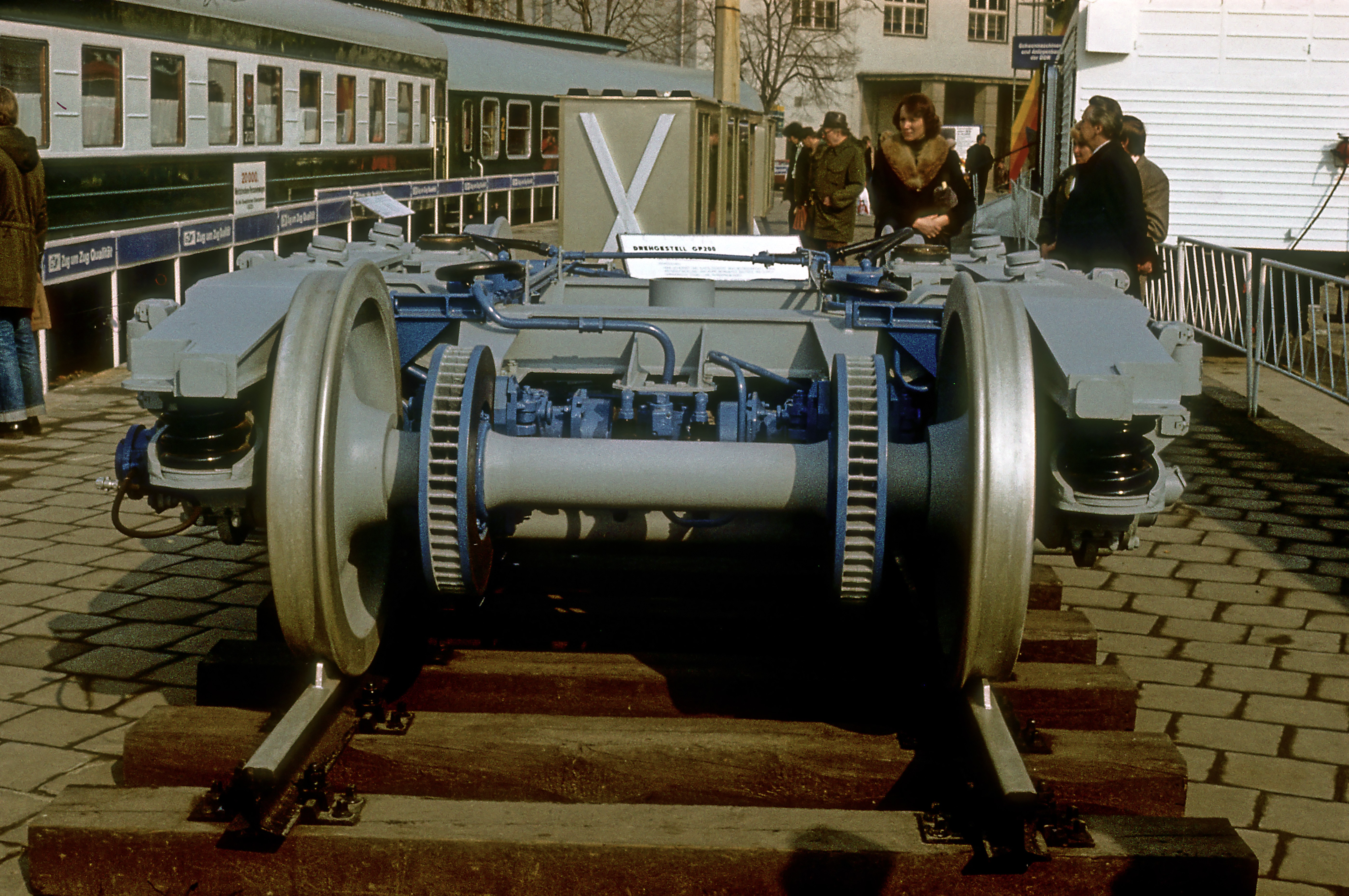 Erstvorstellung, Gemeinschaftsentwicklung mit VÚKV Prag. Scheibenbremsversion, eine klotzgebremste wurde ebenfalls vorgestellt. Diese gelangte jedoch nicht unter deutsche Fahrzeuge.